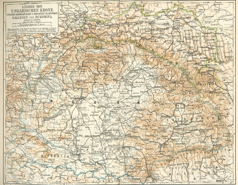 LÄNDER DER UNGARISCHEN KRONE, GALIZIEN UND BUKOWINA. Maßstab 1:3,300,000. Regierungssitze sind doppelt, die Hauptorte der Komitate in Ungarn-Siebenbürgen und Kroatien-Slavonien, sowie der Bezirkshauptmannschaften in Galizien und Bukowina sind einfach unterstrichen.